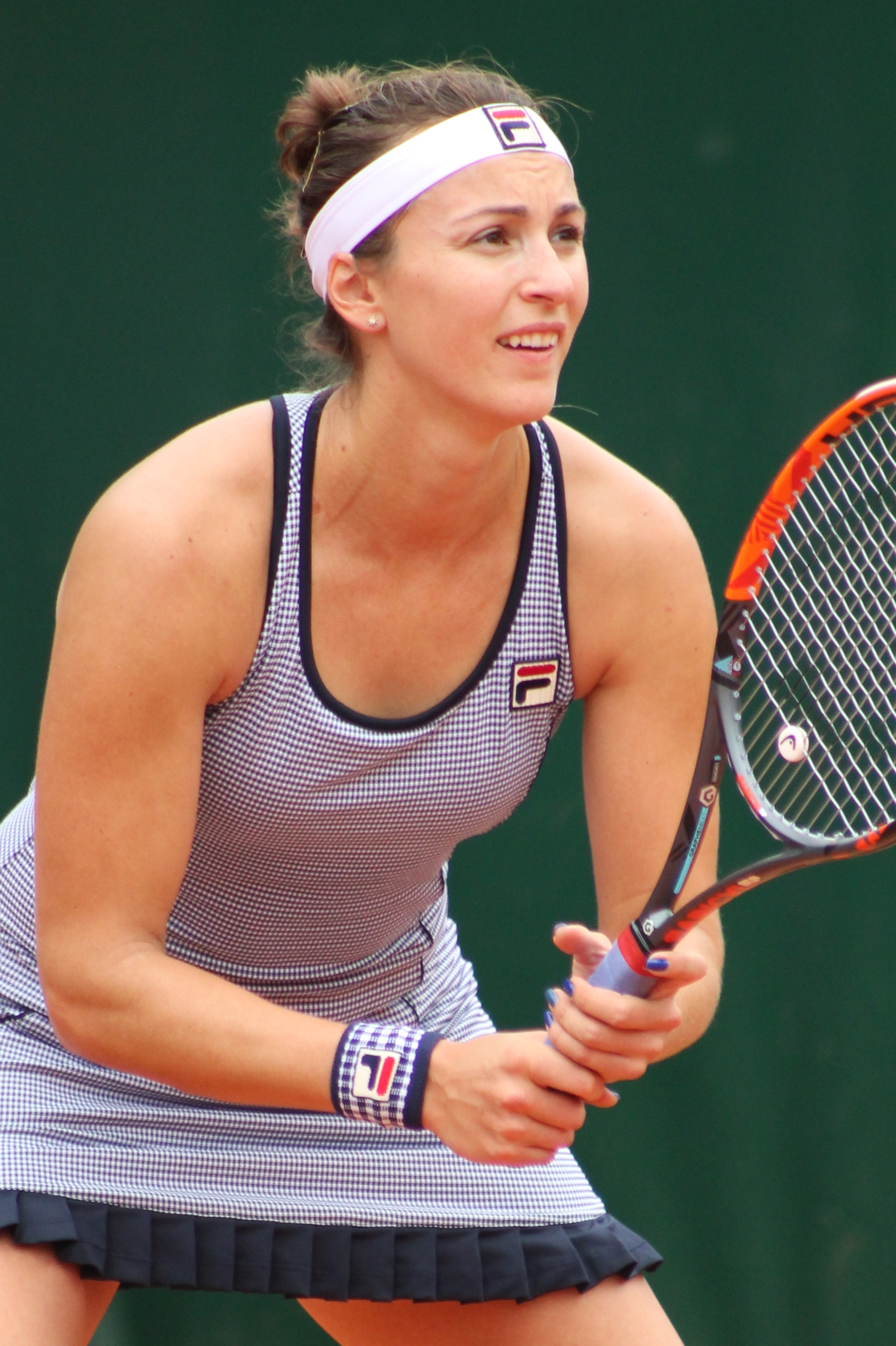 Shvedova RG16 (7)